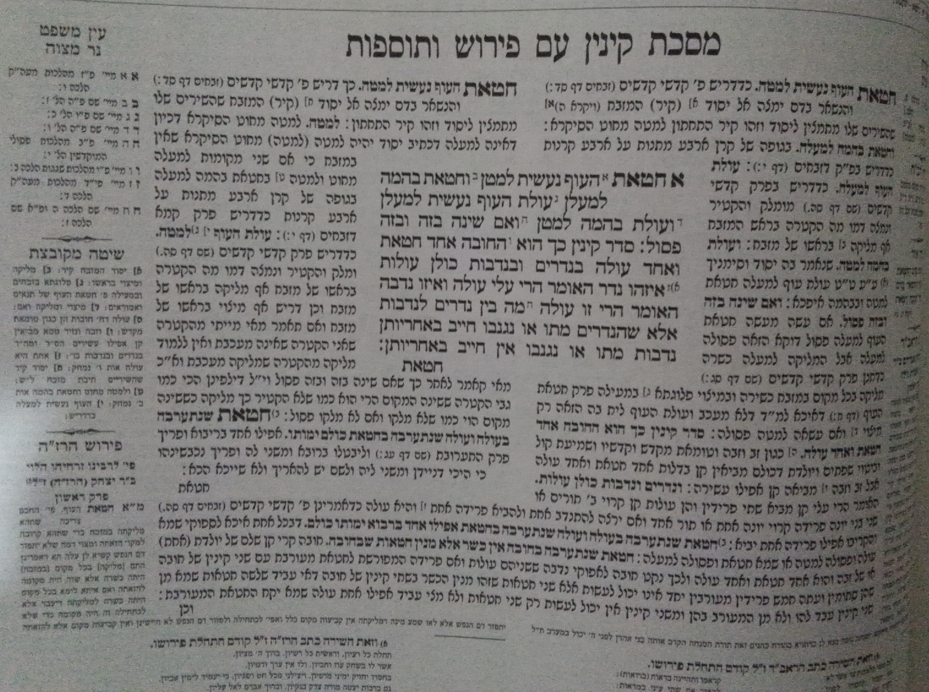 הדף של המסכת